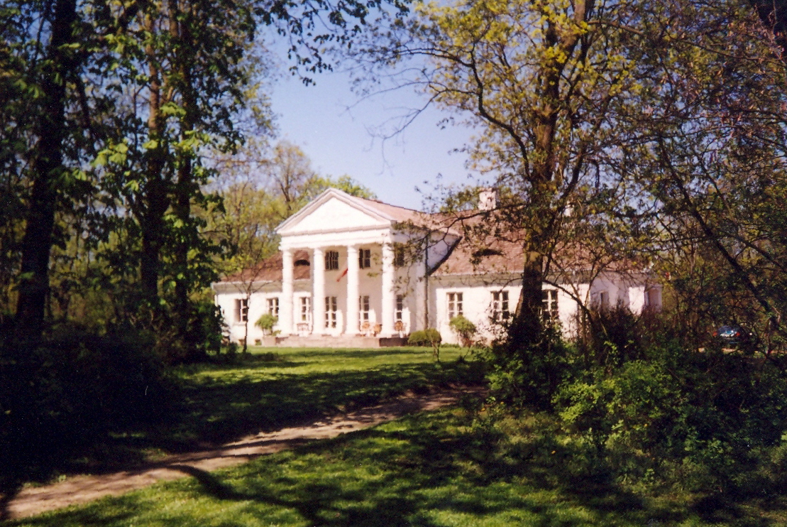 Tułowice - dwór (zabytek nr 238/61).